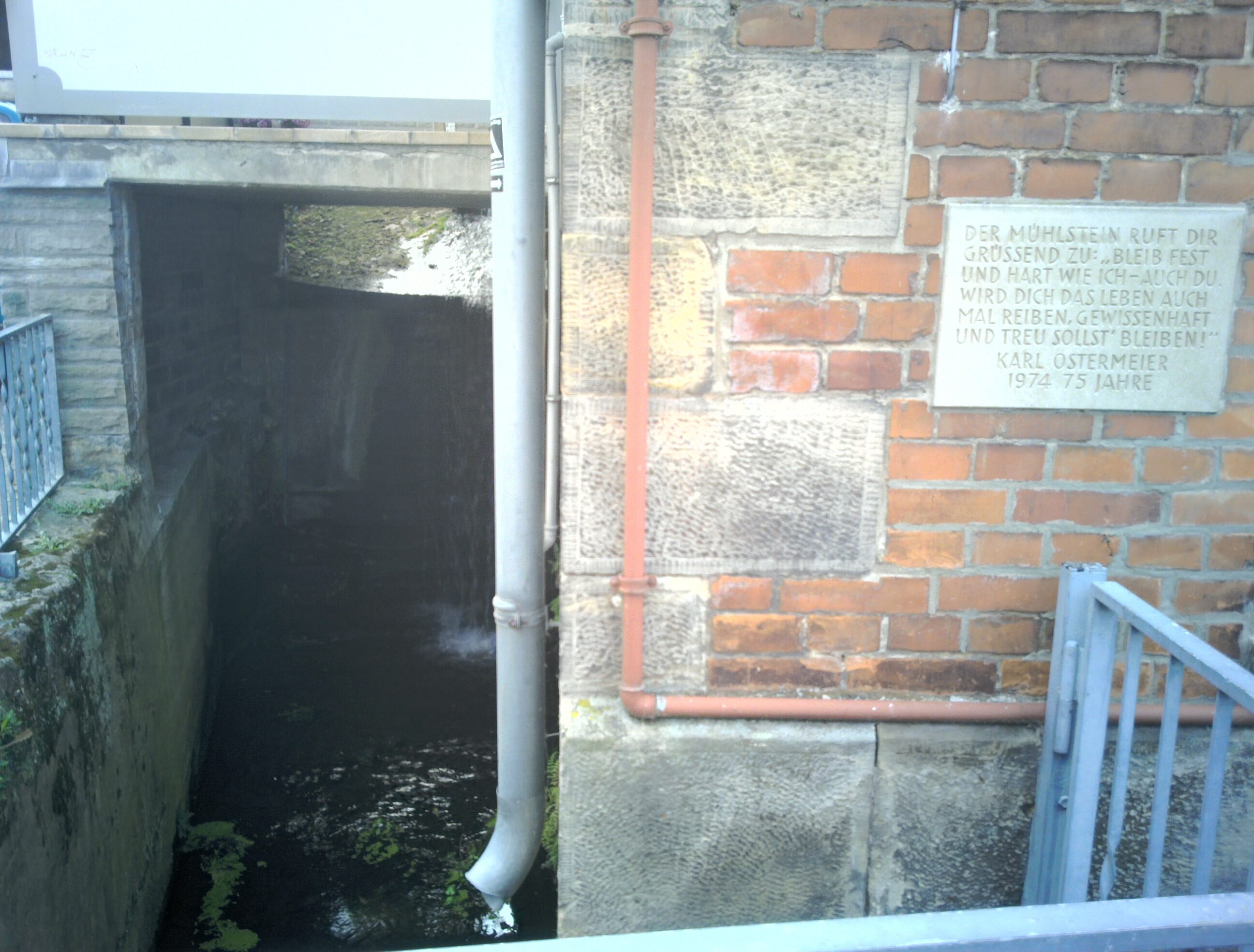 Ehemaligen Mittelmühle in Wennigsen (Deister), Blick auf die vorherige Position des Wasserrads